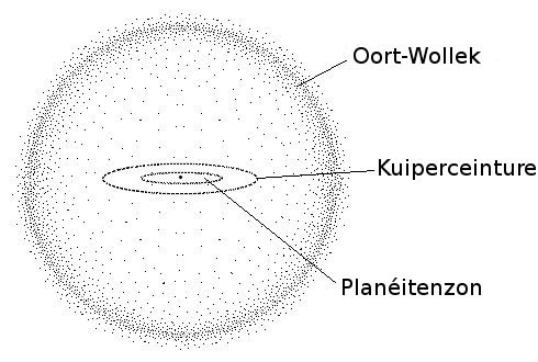 Zeichnung Dr. H. Sulzer (Benutzer:herbye), Bad Muskau Mar 2004, GNU FDL